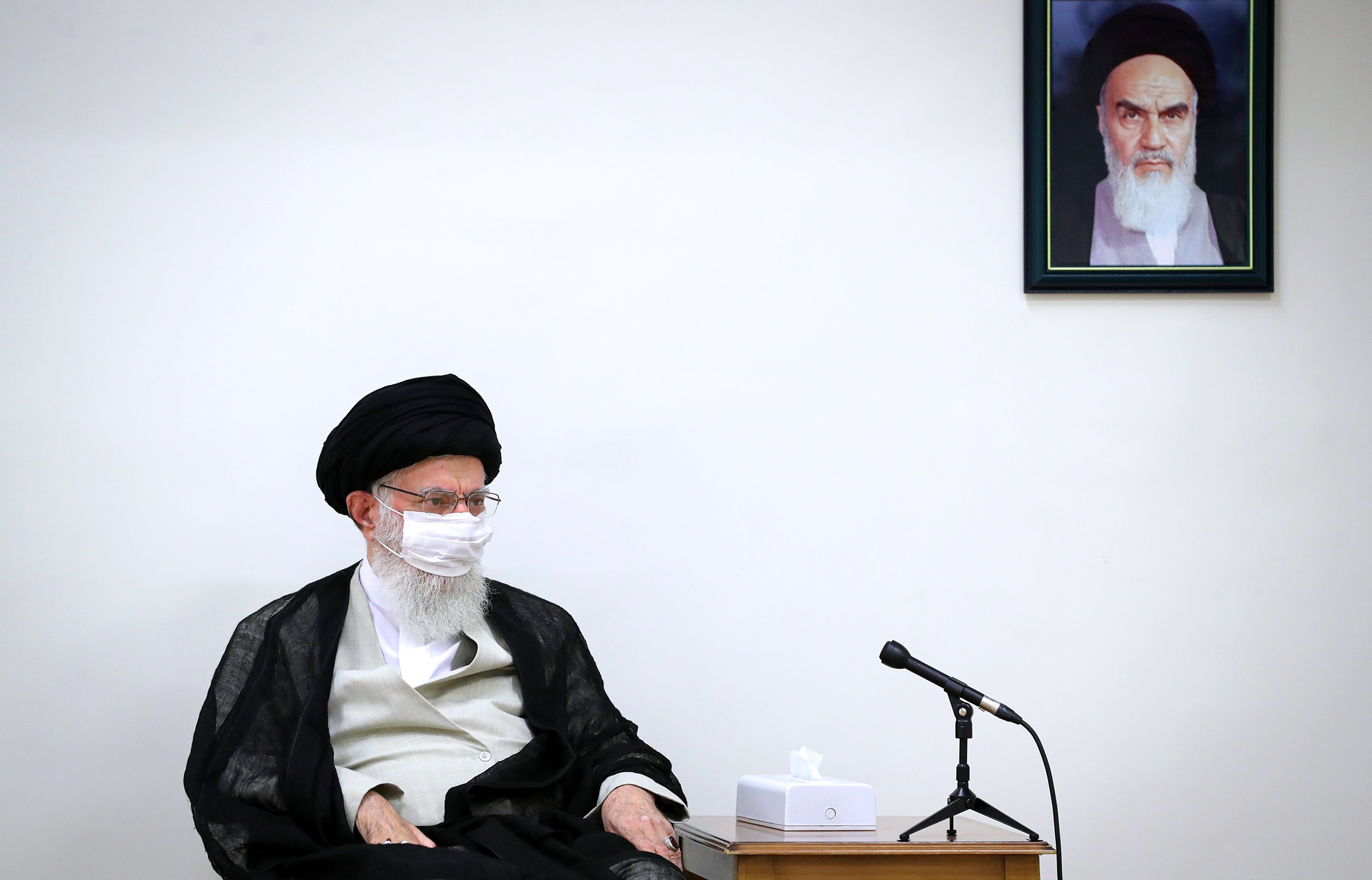 علی خامنه ای همراه با ماسک در 1399